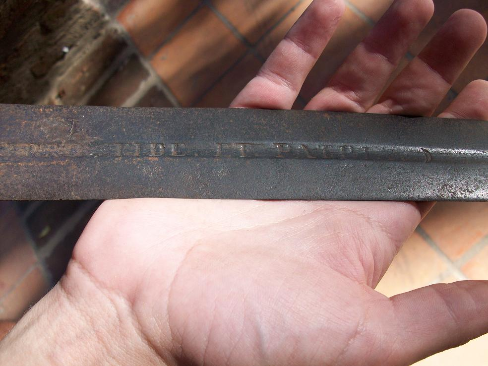 Espada perteneciente al conquitador español Bartolomé de Bracamonte.